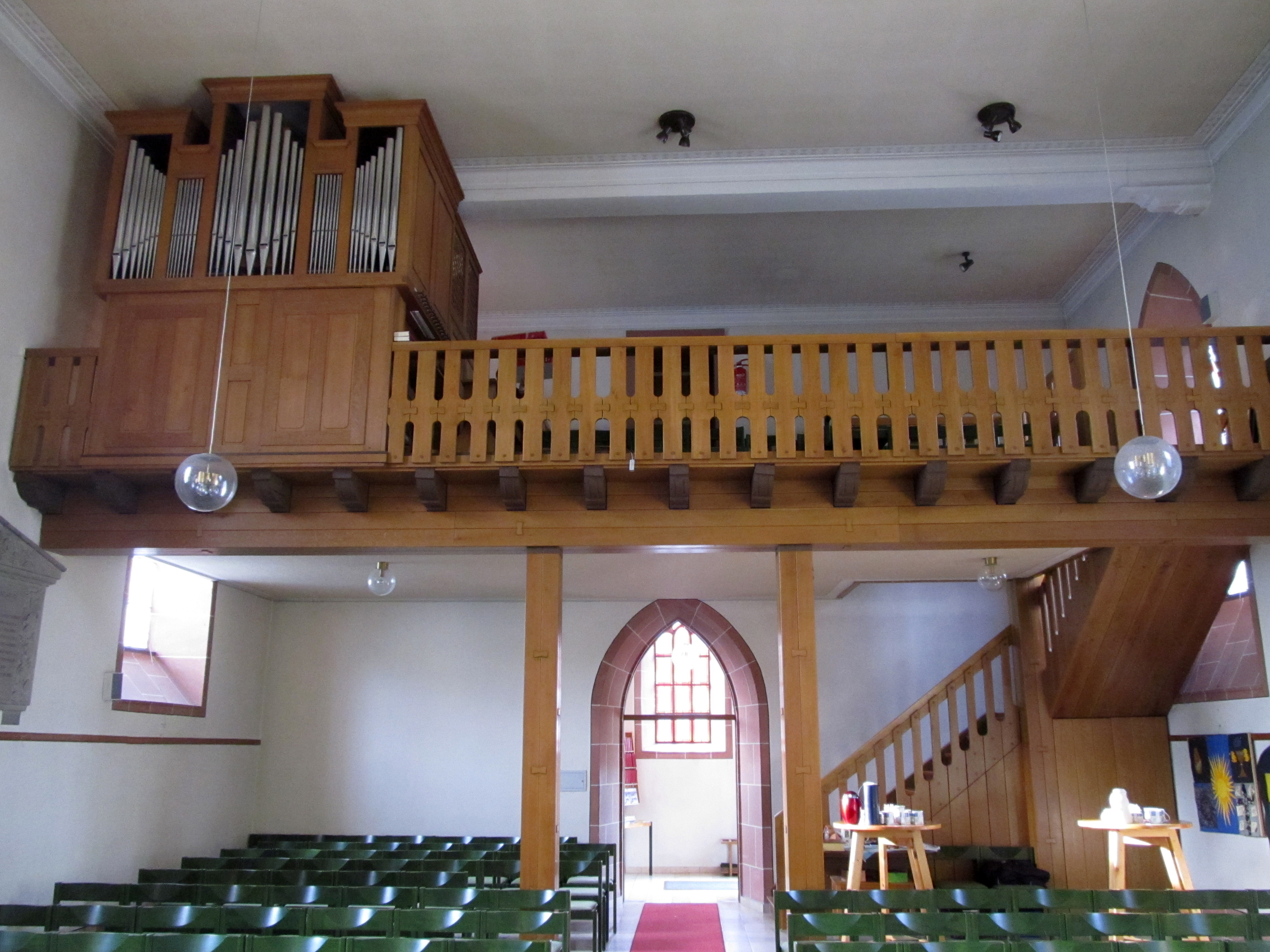 Blick ins Innere der protestantischen Apostelkirche in Einöd, einem Stadtteil von Homburg, Saarland